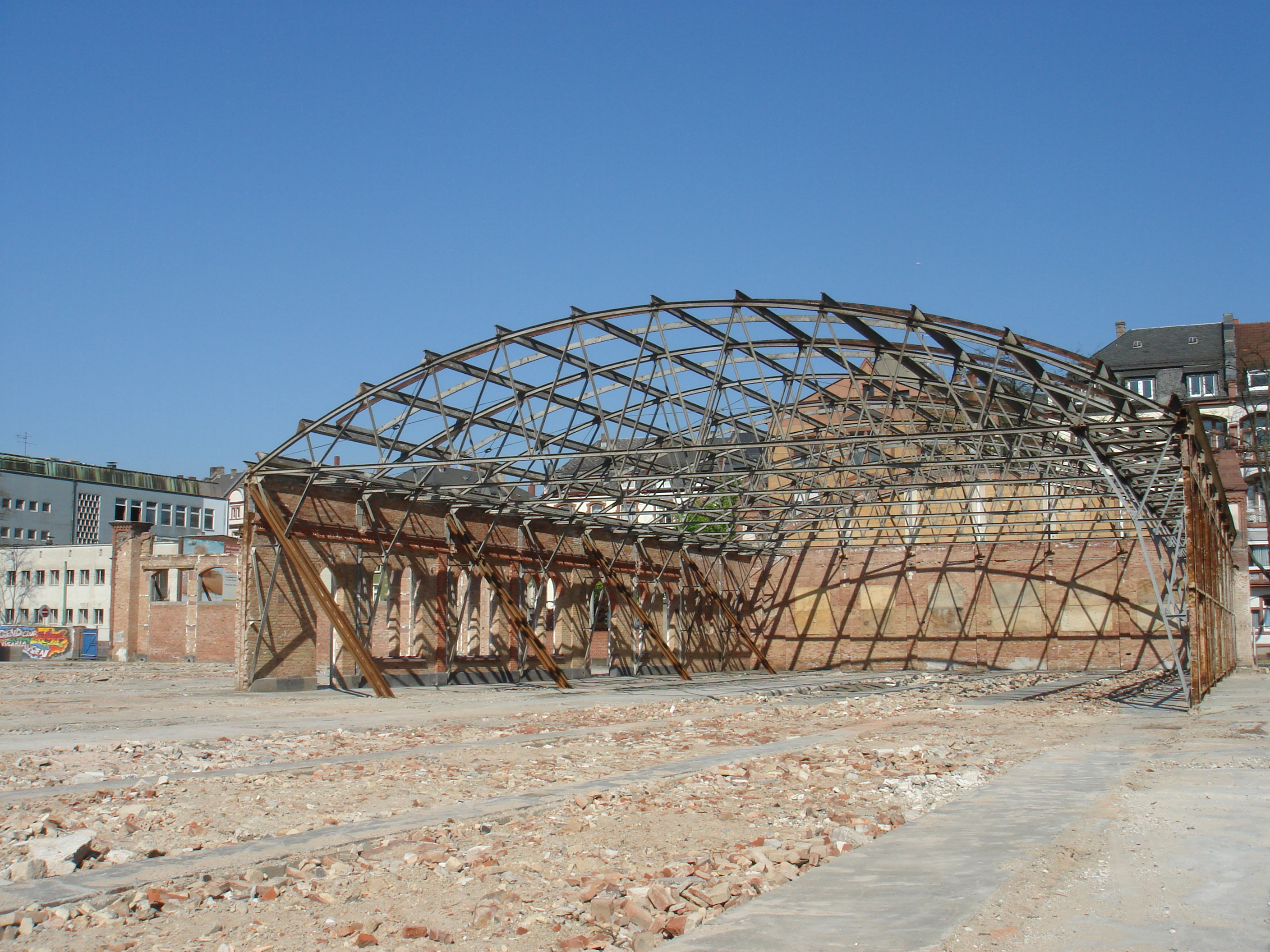 Überreste des Sachsenhäuser Depots vor dem Umbau, Frankfurt am Main